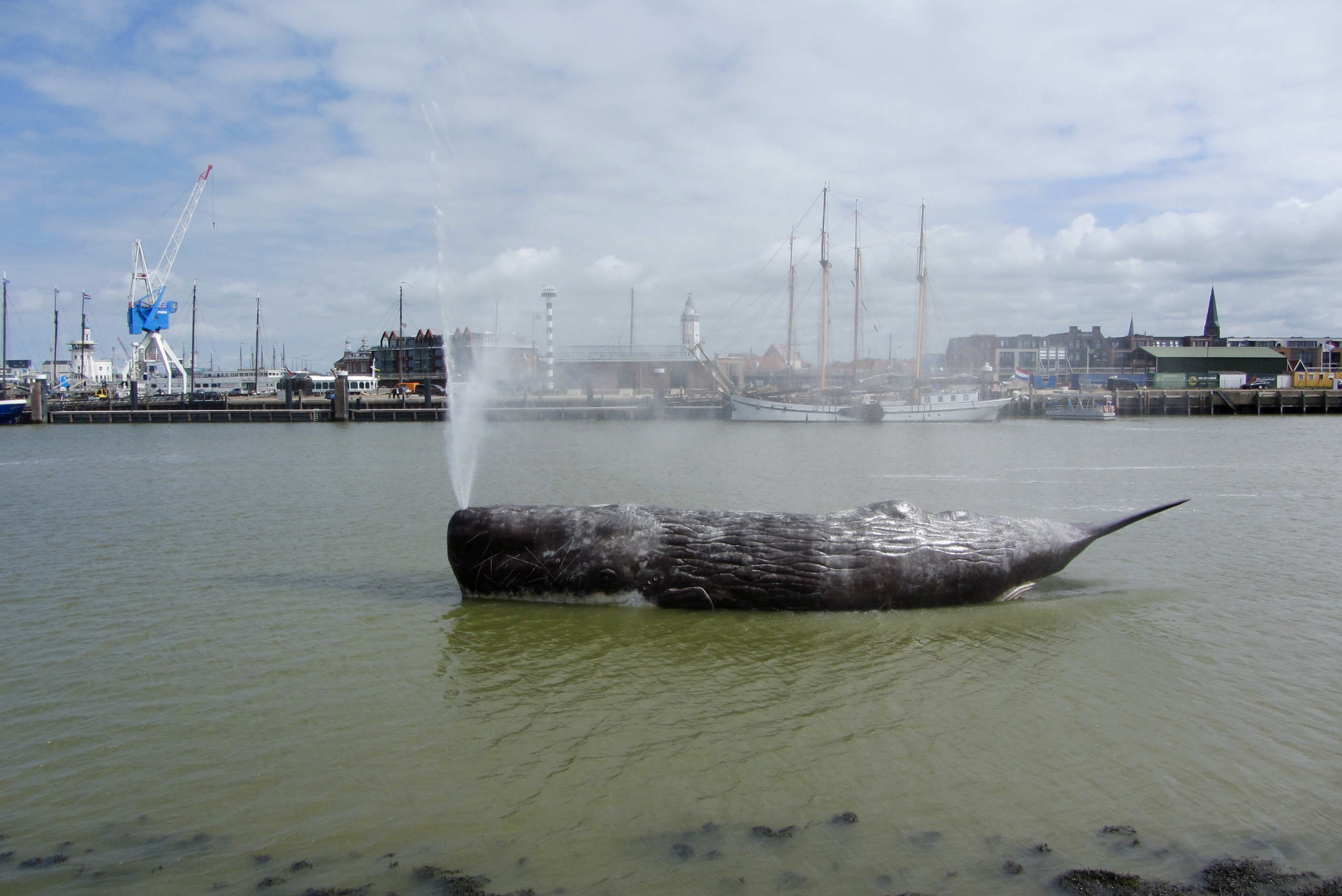 Jennifer Allora en Guillermo Calzadilla, 2018